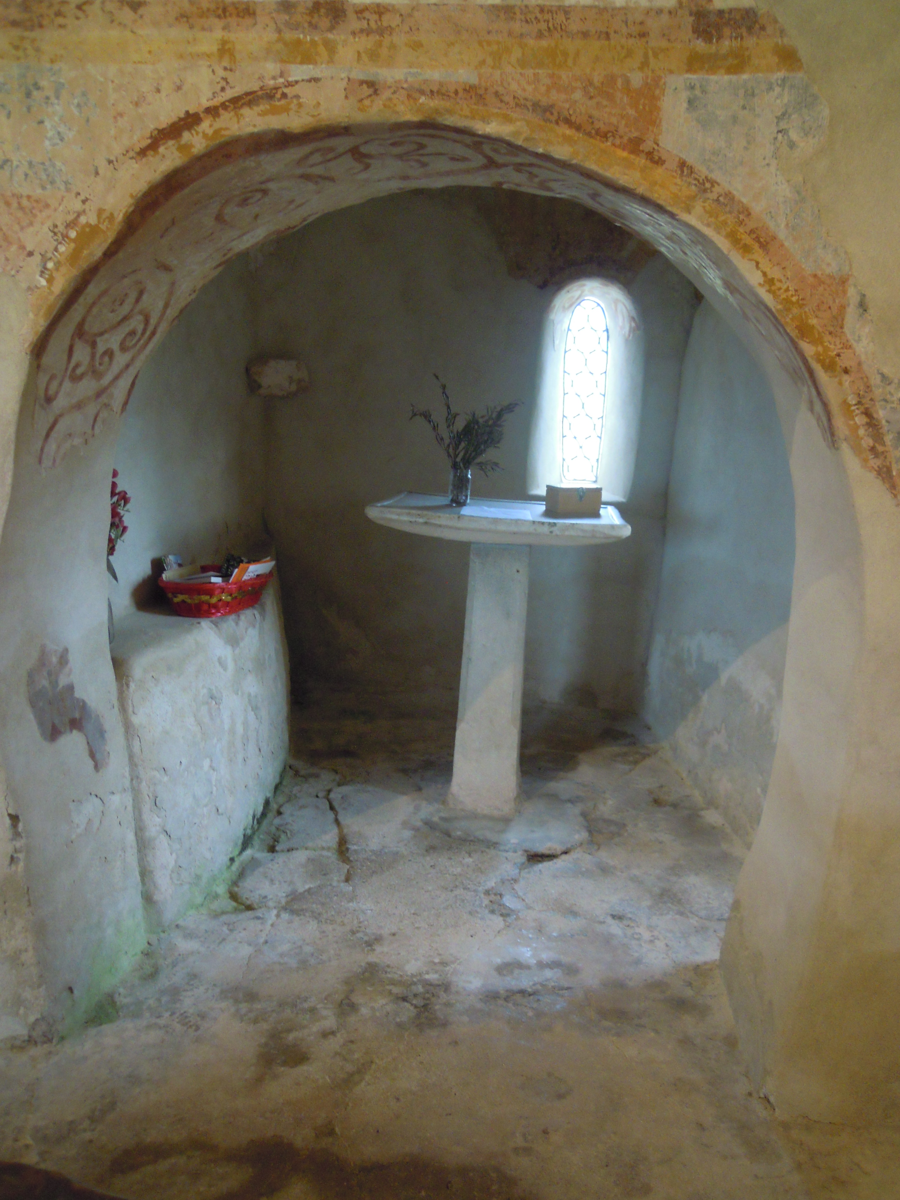 abside dx